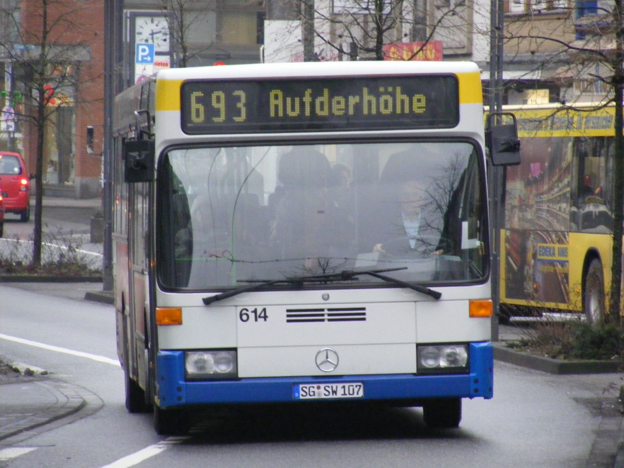 Solingen Mercedes bus nr 614, Linie 693.